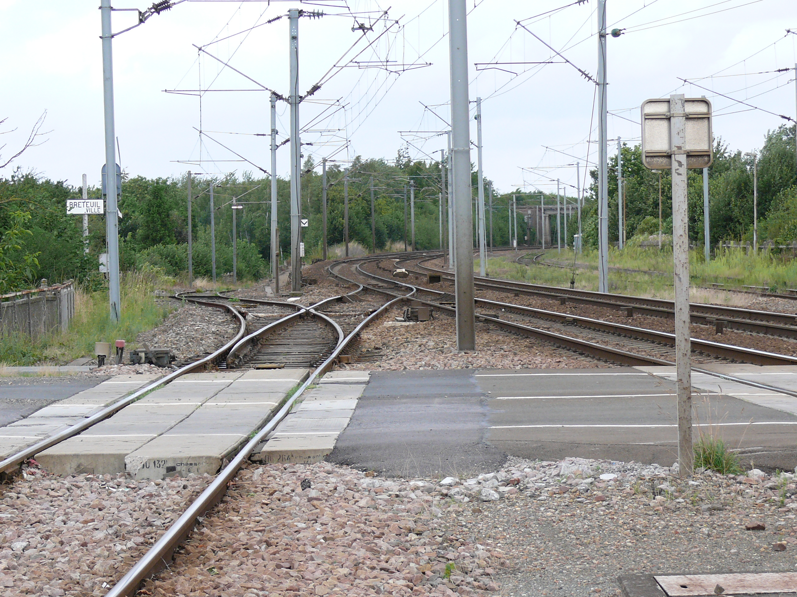 La bifurcation de Breteuil-Embranchement (Somme - Picardie - France) : A gauche, l'embranchement vers Breteuil-Ville